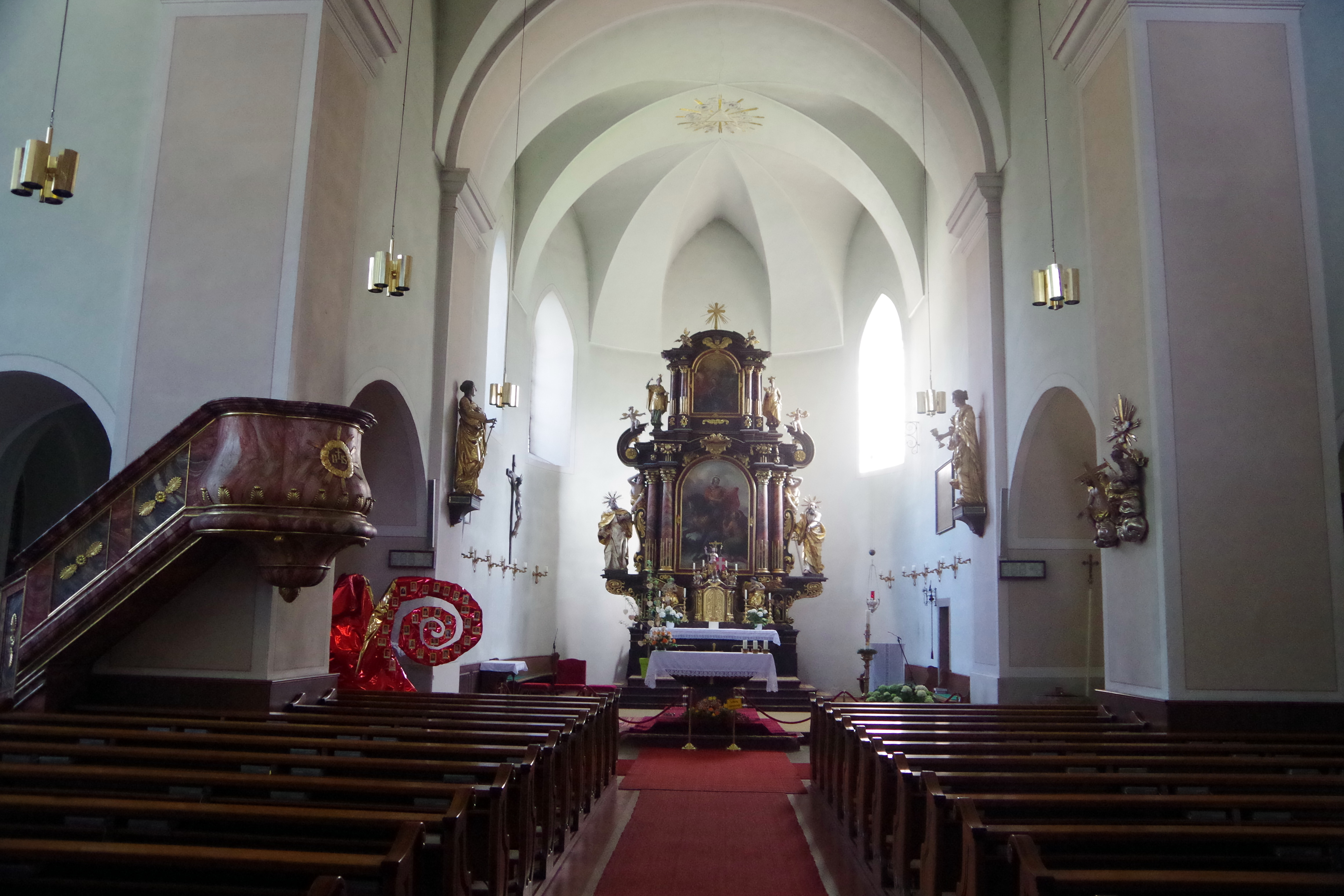 kath. Kirche im Ortszentrum von Goisern